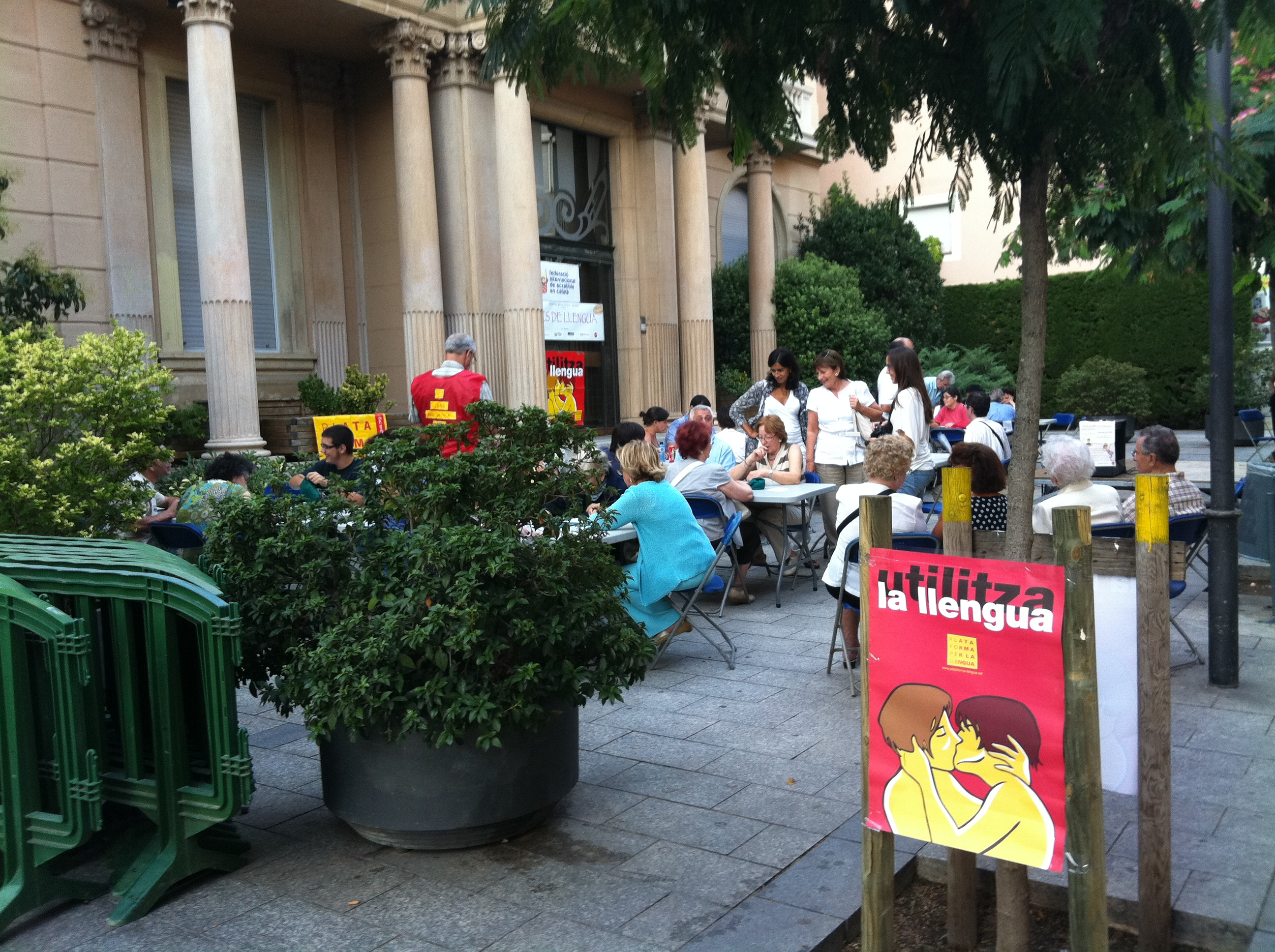 Sabadell